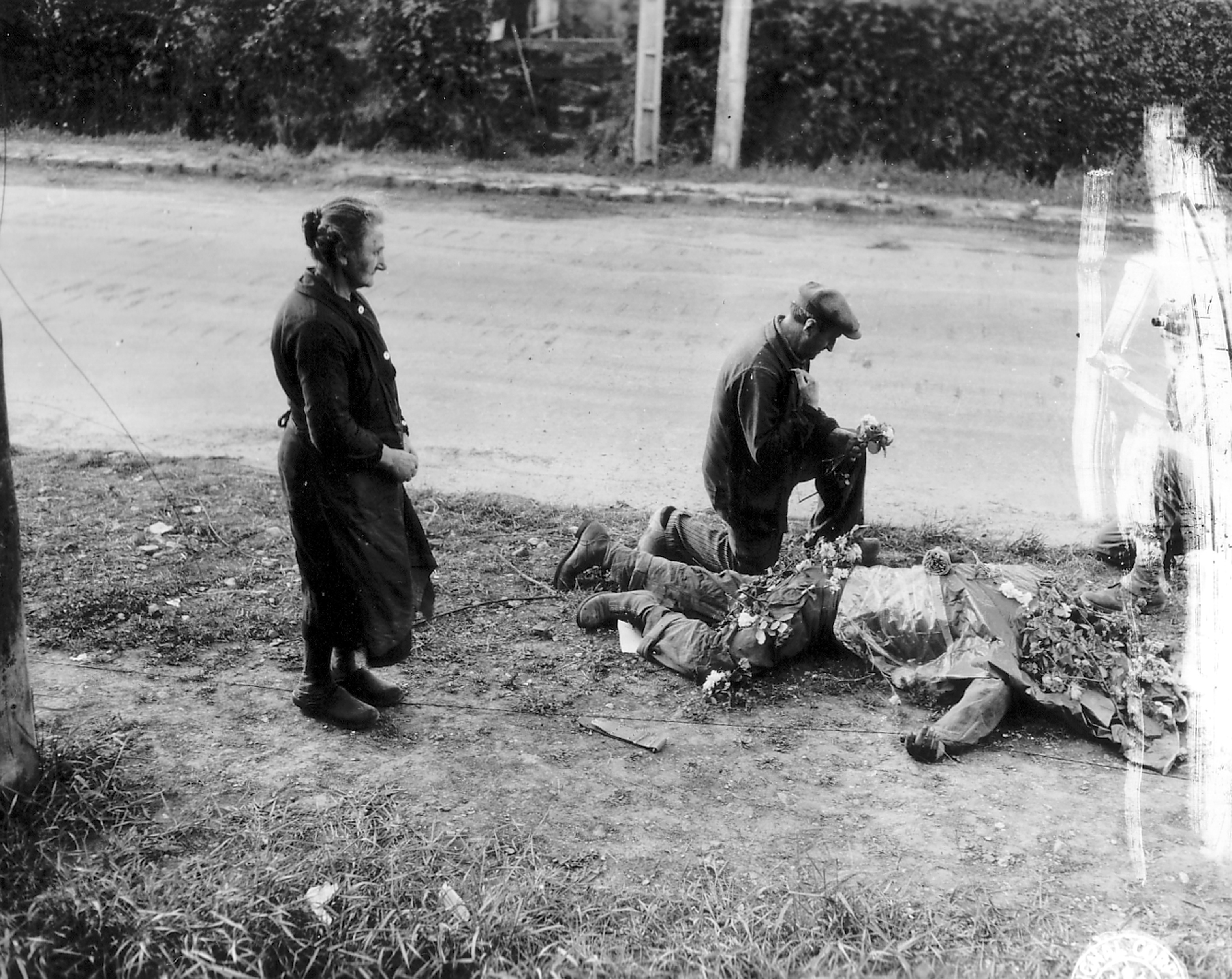 Des Français posent des fleurs sur des corps de soldats américains.